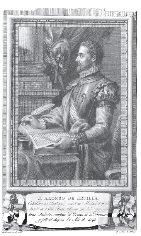 Retrato de Alonso de Ercilla.